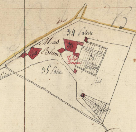 Boaçà en el Cadastre napoleònic del 1812 (Arxius Departamentals dels Pirineus Orientals)